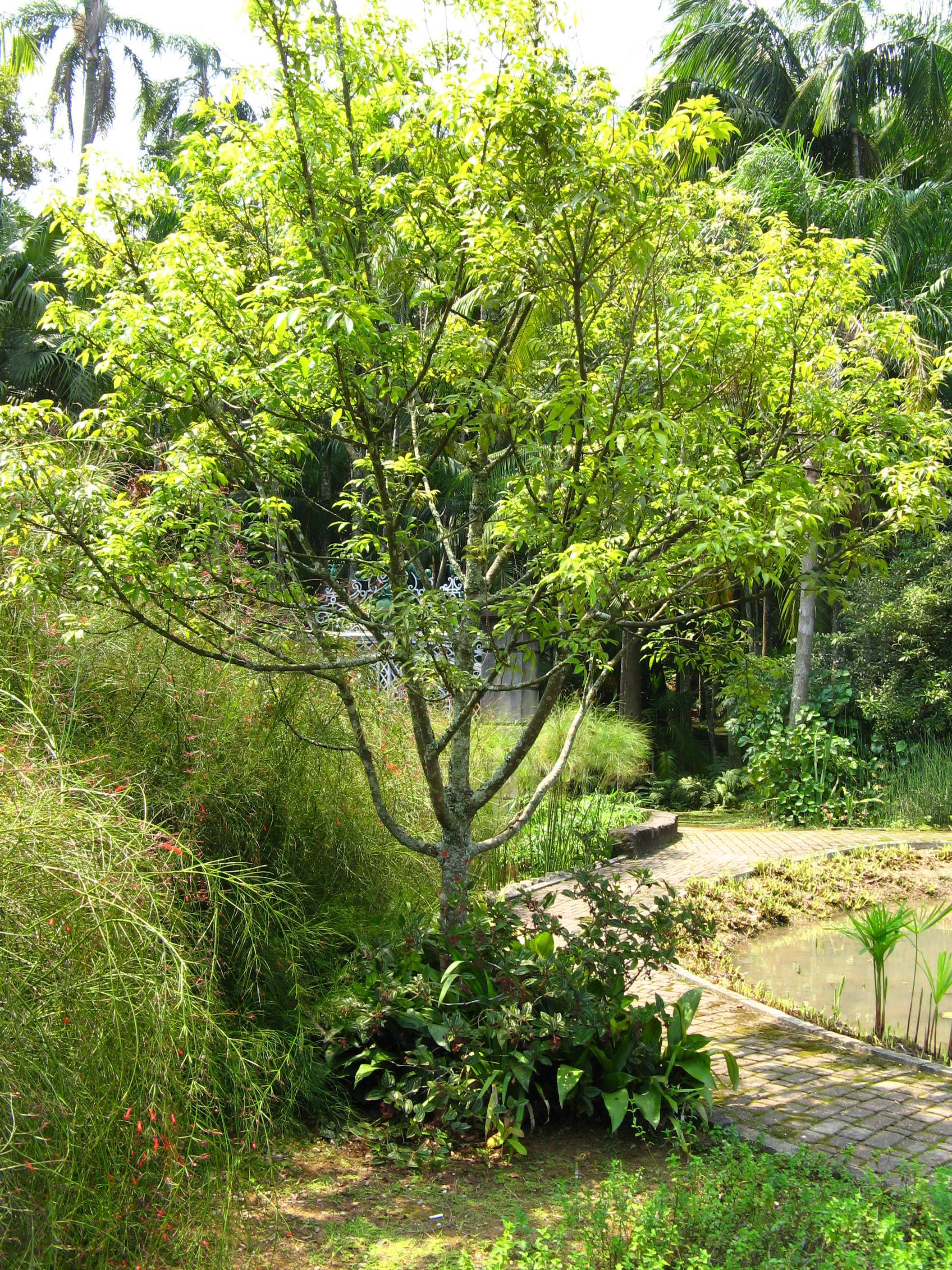 Pindaíba (Xylopia brasiliensis), Jardim botanico de São Paulo